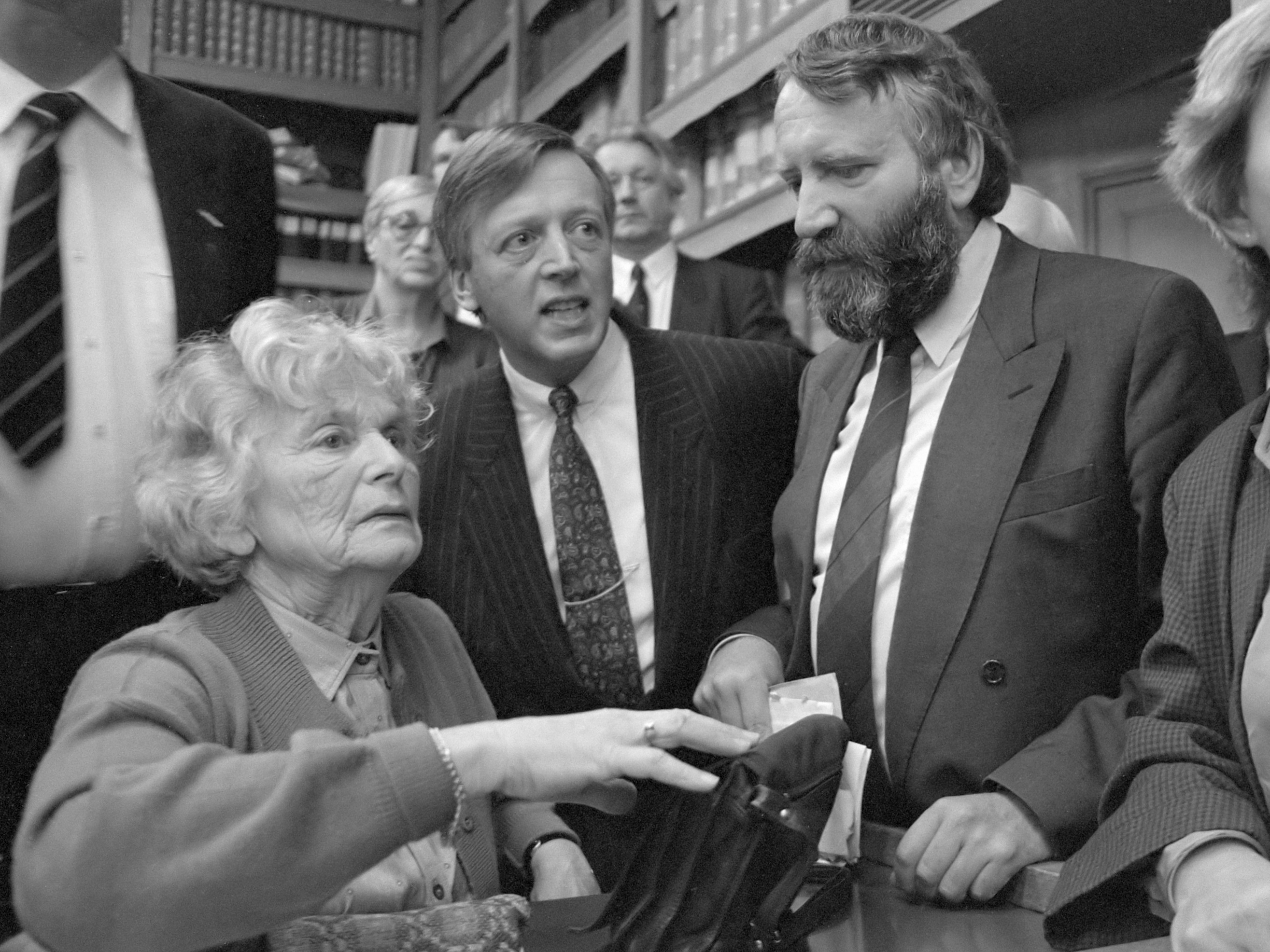 Hoorzitting in de Tweede kamer met de Commissaris van Justitie over vrijlating van de oorlogsmisdadigers "Twee van Breda". Mevrouw Fels-Kupferschmidt (l) en rabbijn Soetendorp (2e van rechts) 26 januari 1989